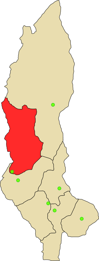 Provincia de Bagua en departamento Amazonas